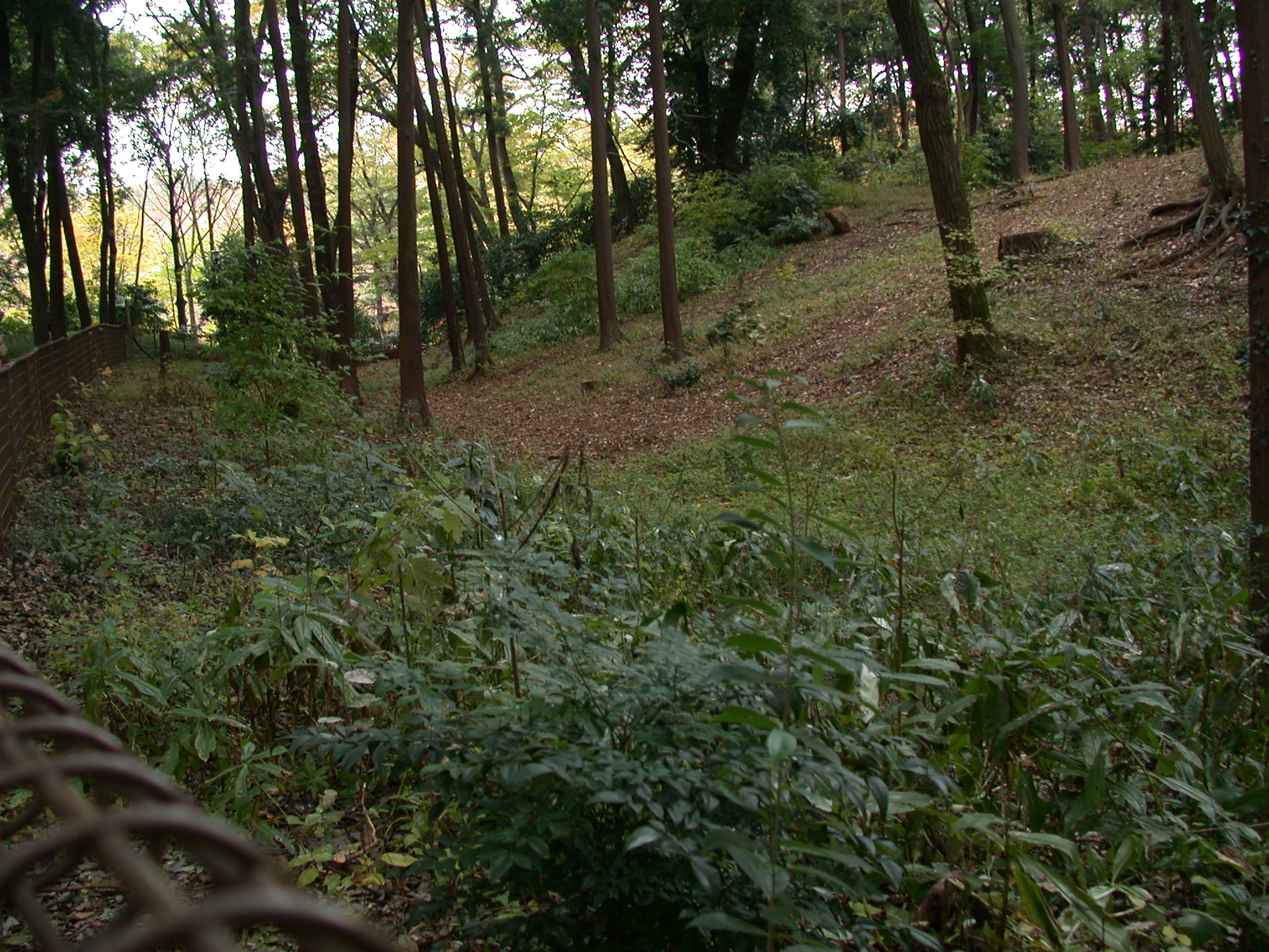 Shakujii Castle